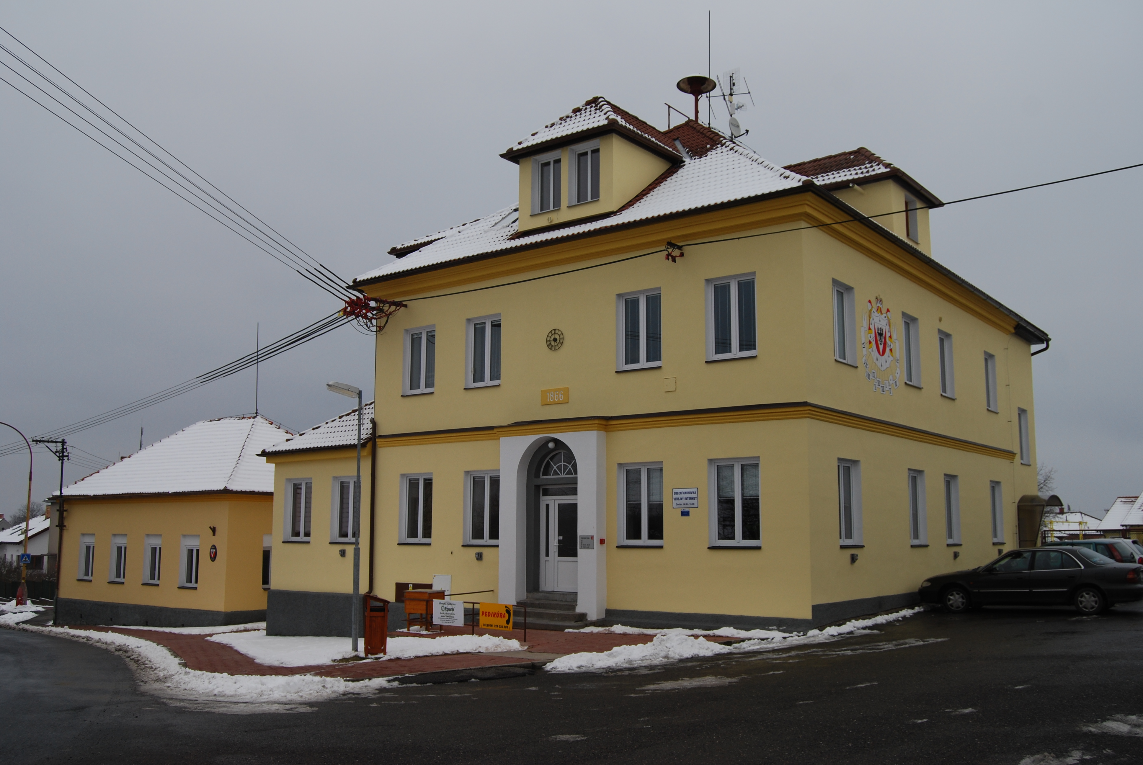 Obecní úřad. Stará Vráž je vesnice, část obce Vráž v okrese Písek. Okres Písek. Česká republika.